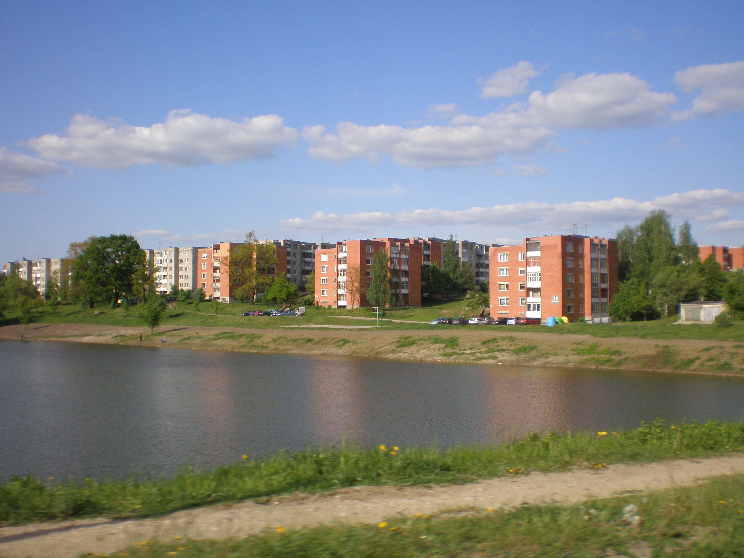 „Lakštingalų“ mikrorajonas Jonavoje